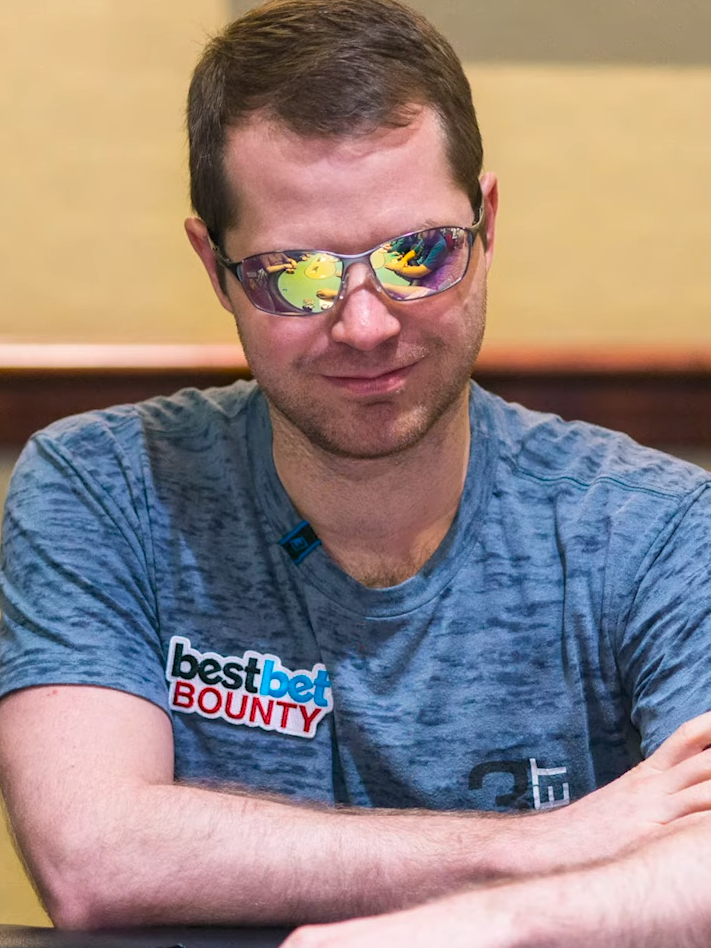 Jonathan Little beim WPT bestbet Bounty Scramble